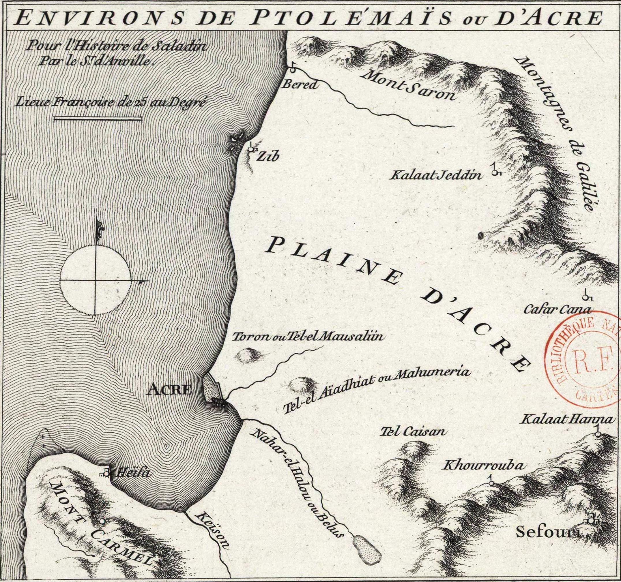 Environs de Ptolémaïs ou d'Acre pour l'Histoire de Saladin / par le Sr d'Anville.